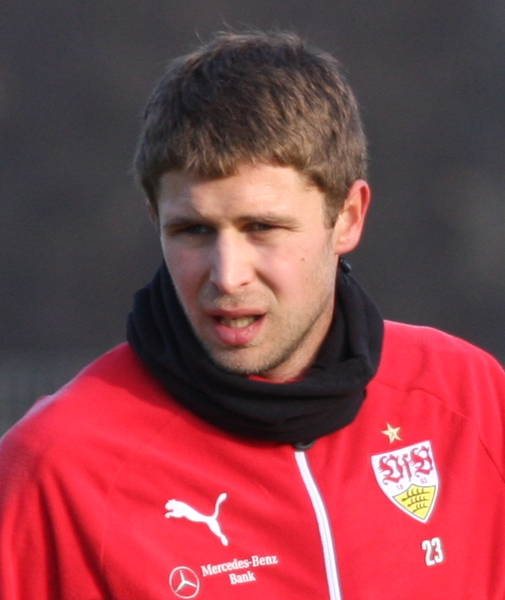 Artem Kravets beim ersten Training in Stuttgart. Bild von